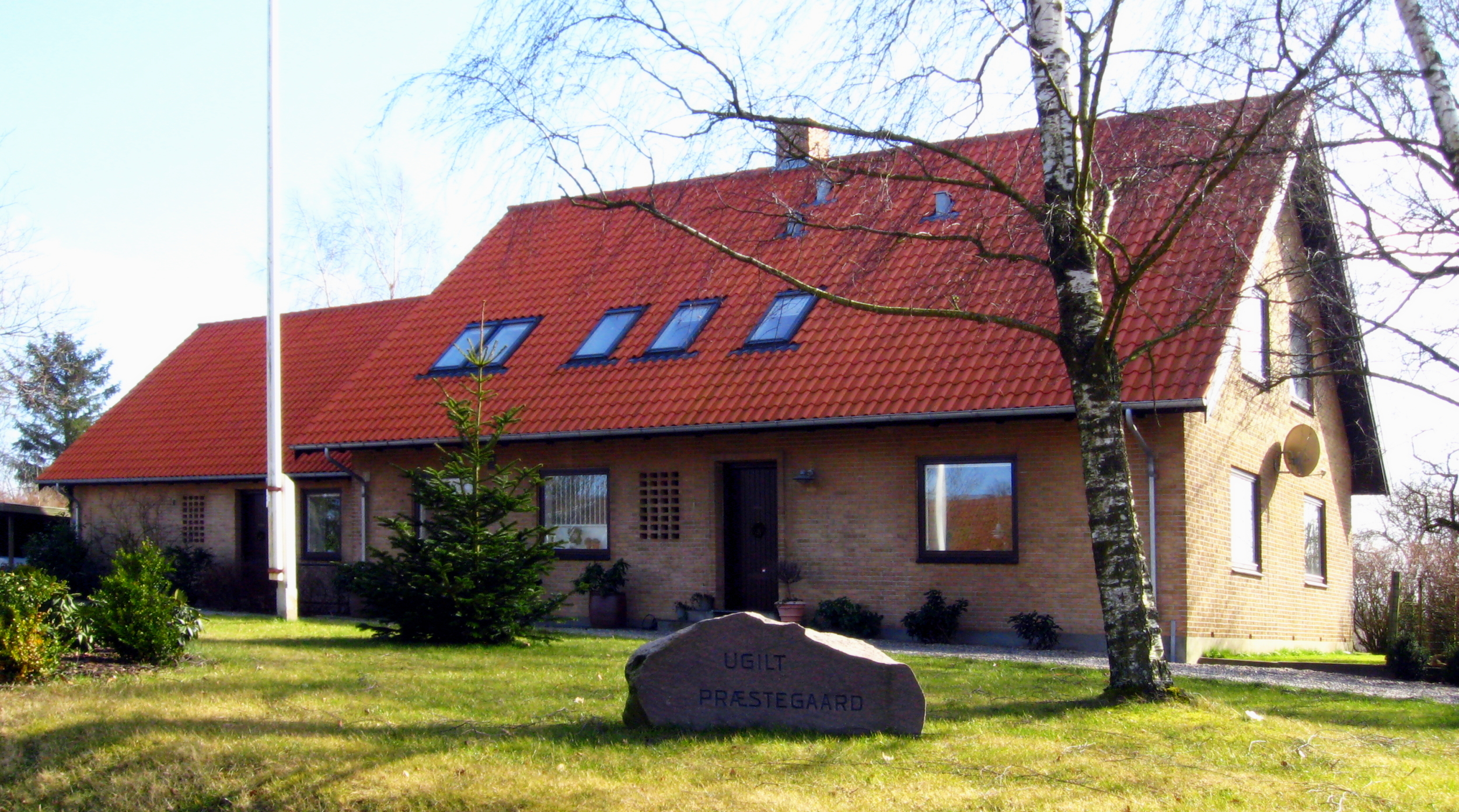 Ugilt Præstegård, Hjørring Kommune